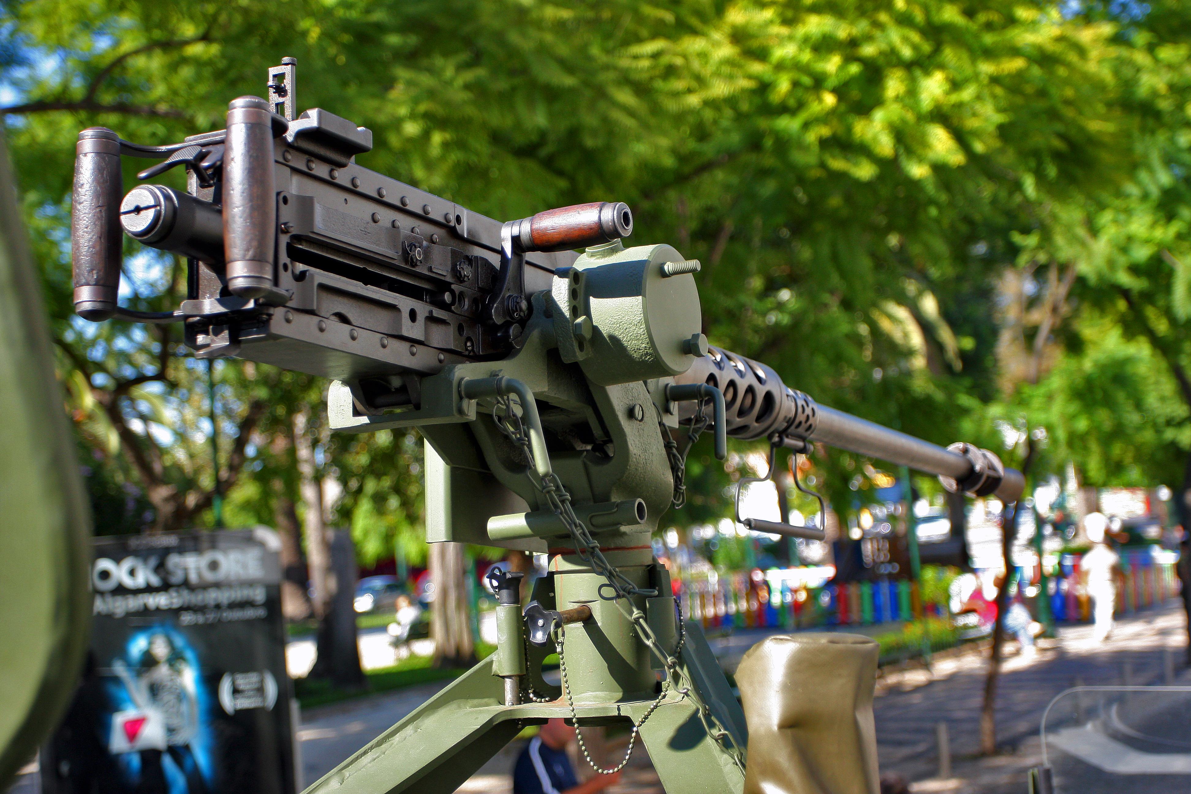 Metralhadora pesada M2 Browning do Exército Português, nas Comemorações do Dia do Exército em Faro, Algarve, Portugal.